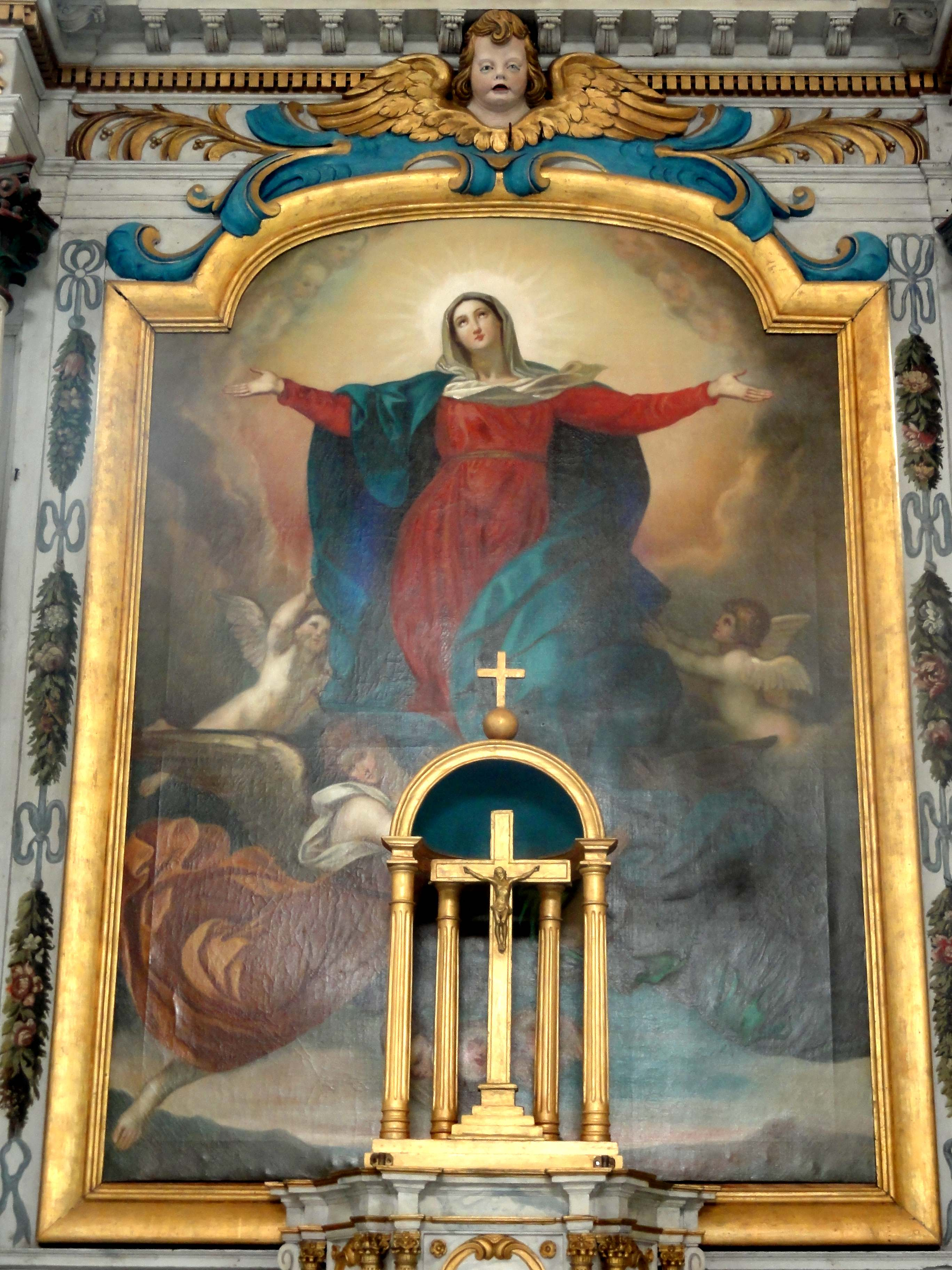 Retable majeur, tableau - L'Assomption de la Sainte Vierge.